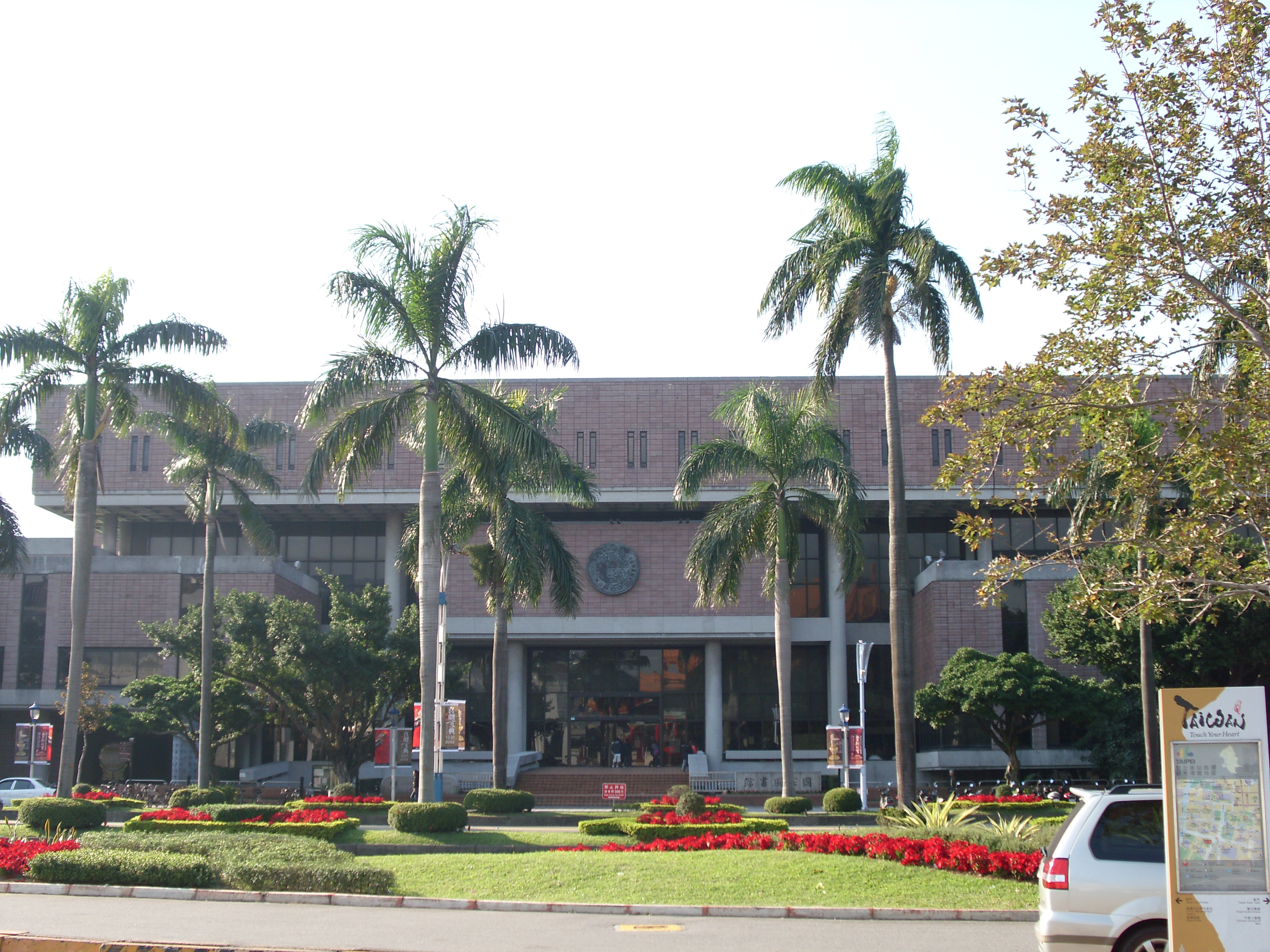 Bân-lâm-gú: 國家圖書館總館。翕相地點：臺北市自由廣場頭前。